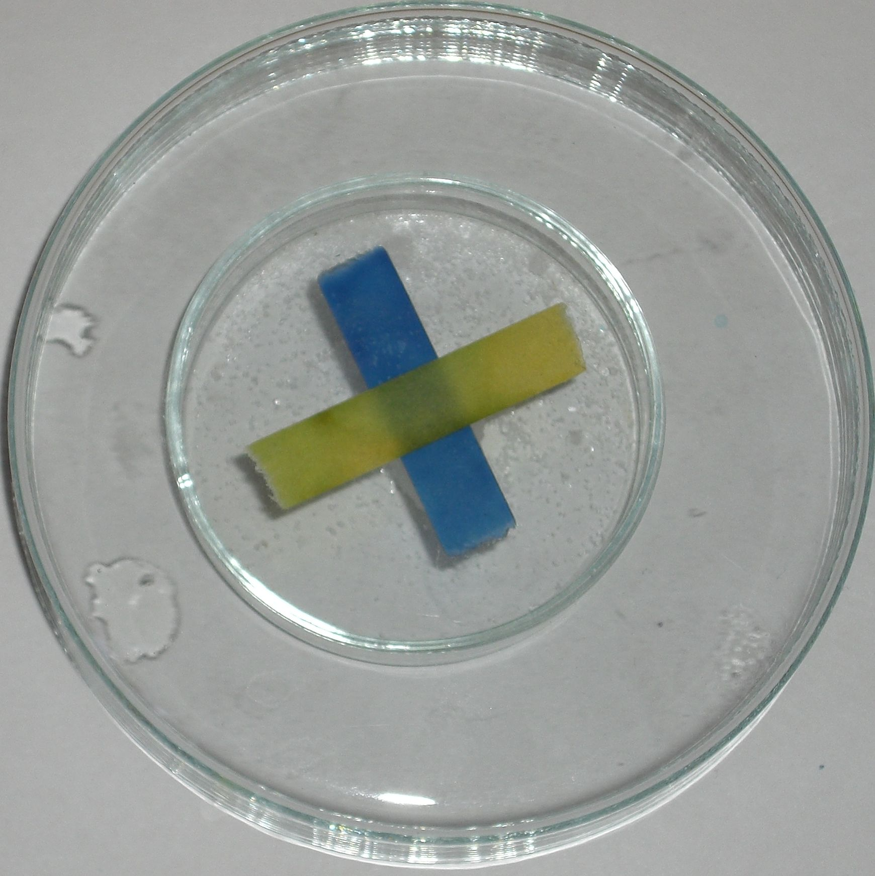 positiver Kreuzprobennachweis